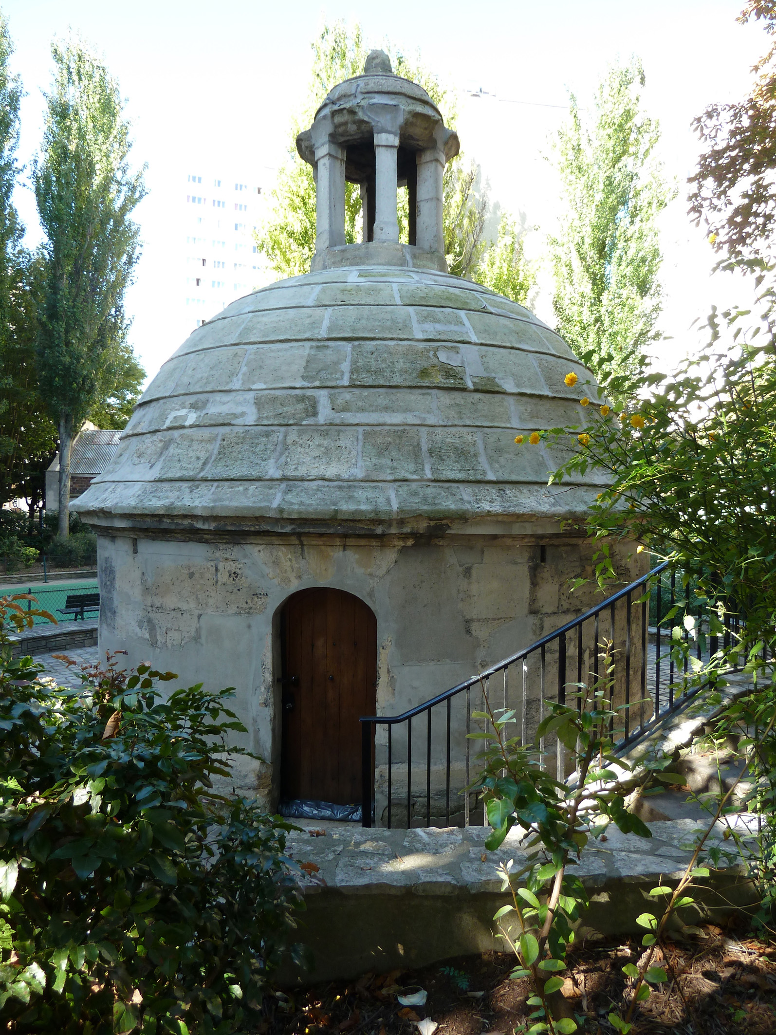 Regard de la Lanterne, dans le jardin du Regard-de-la-Lanterne, Paris 19e arrondissement.